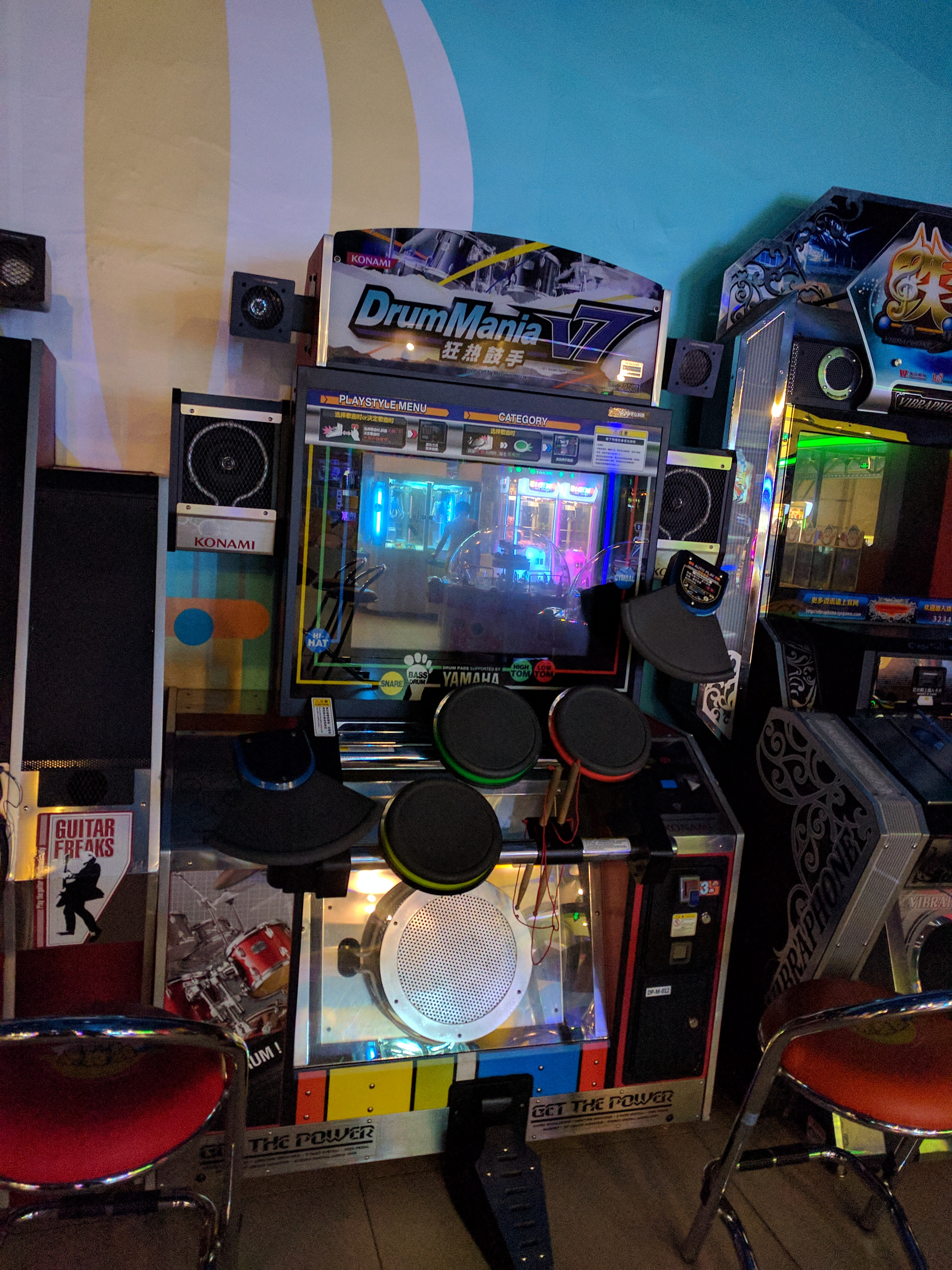 狂热鼓手V7版本